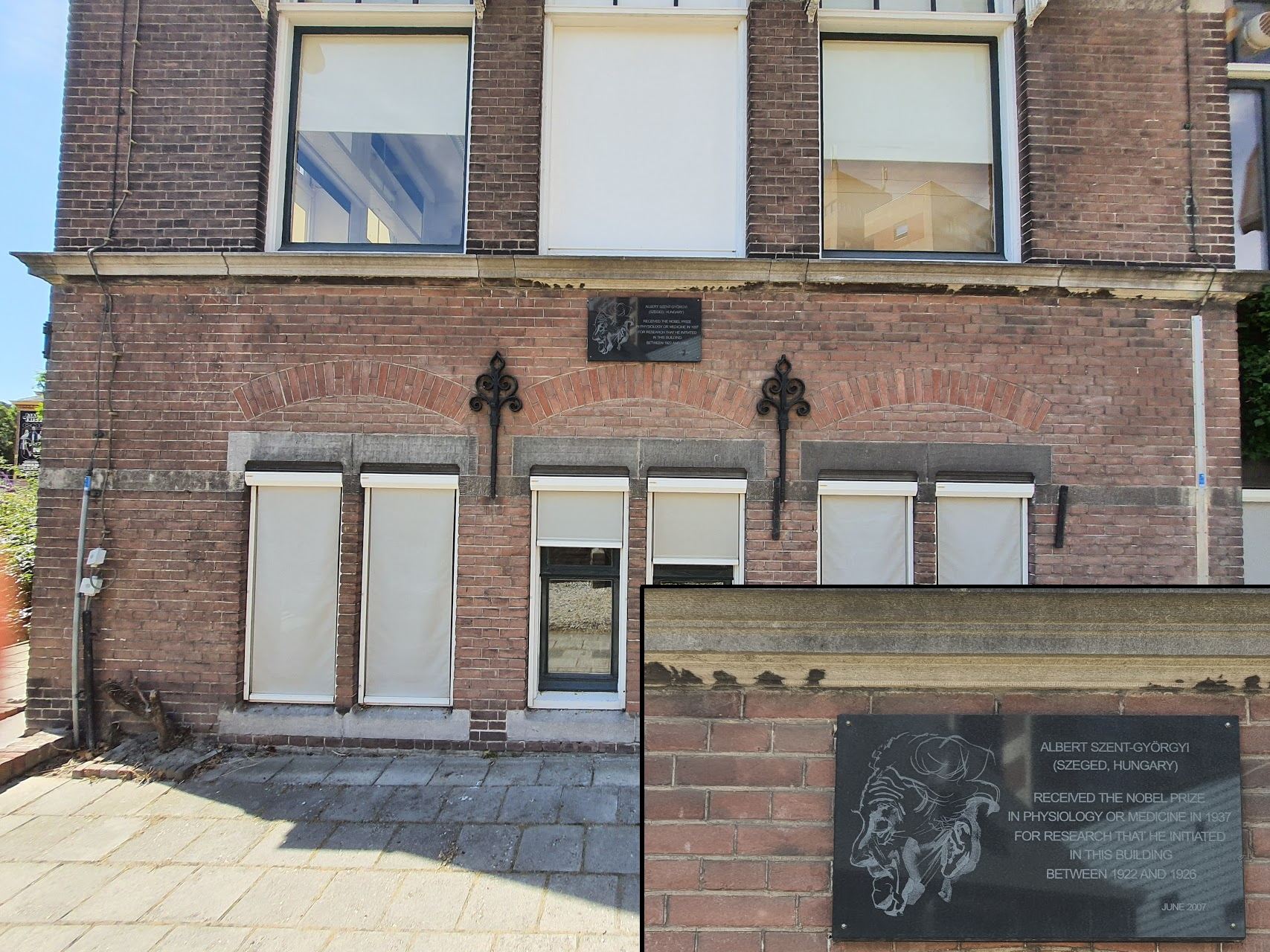 Albert Szent-Györgyi (plakaat, Bloemsingel 1, Groningen, The Netherlands)